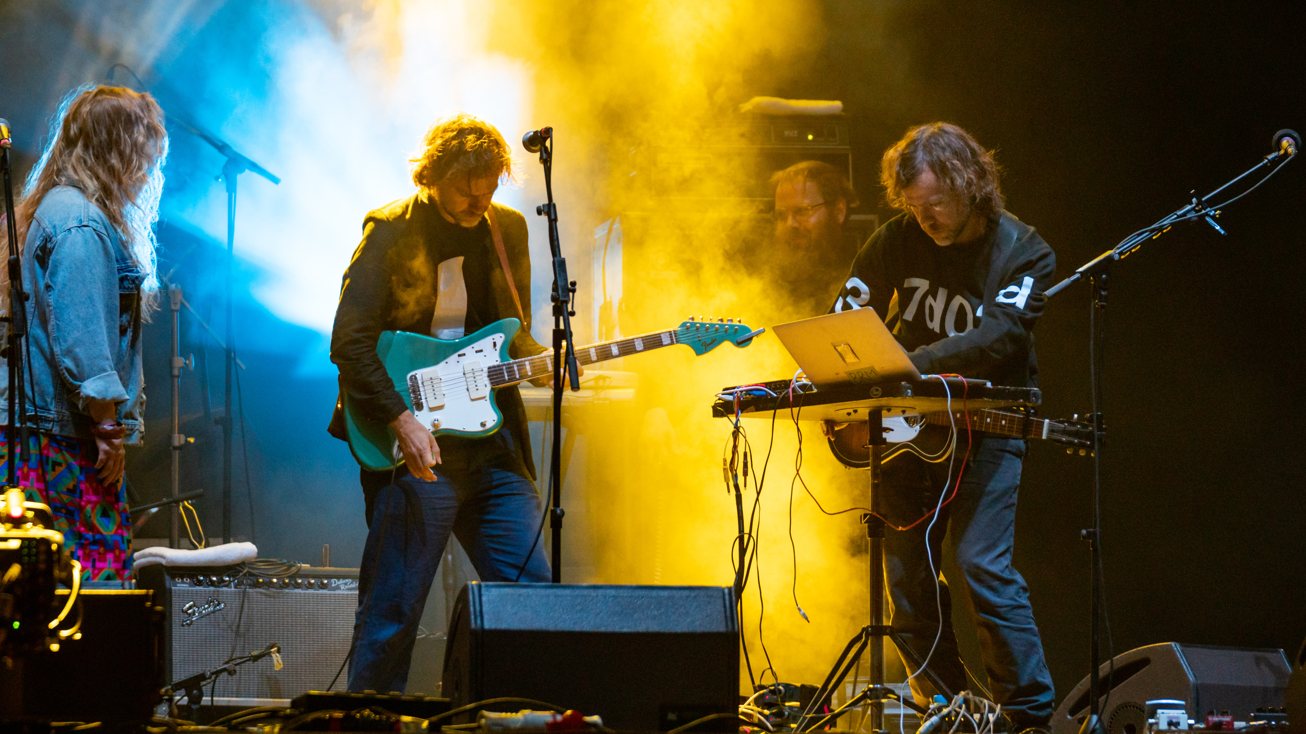 Primavera19_-16